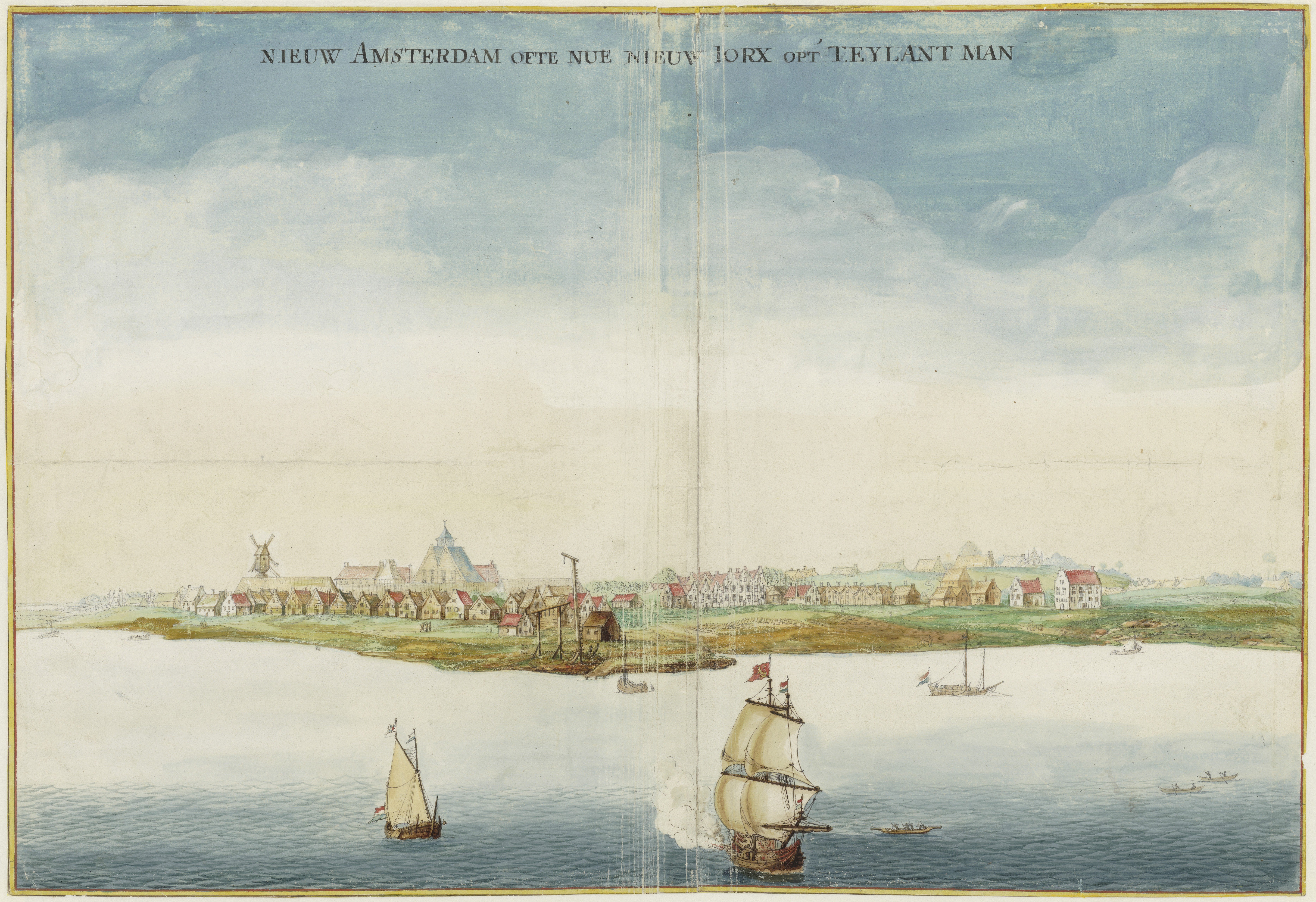 Title in the Leupe catalogue (NA): Gezicht op "Nieuw-Amsterdam ofte nue Nieuw Iorx op 't eijlant Man-[hattan]" van de zeezijdeCf. Koninklijke Bibliotheek, The Hague, inv. nr. 1049B13_074 and Rijksmuseum, Amsterdam, inv. nr. NG-28 and idem, inv. nr. NG-20-D.